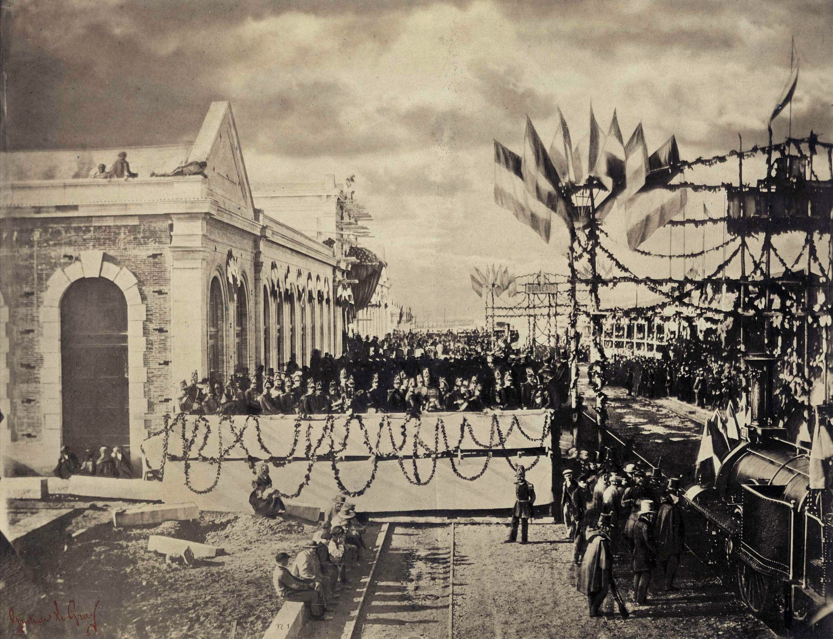 Gare Matabiau, 64 boulevard Pierre Sémard.2 avril 1857.Vue générale de l'inauguration de la ligne du chemin de fer du Midi reliant Bordeaux à Sète.Signature au coin inférieur gauche : "Gustave Le Gray".Cliché fixé sur carton, format du tirage : 28,5 x 36 cm.Tampon sec sur le carton en bas au centre : "Photographie, Gustave Le Gray & Co, Paris". Cette photographie a permis la réalisation d'une gravure, enregistrée sous la cote 20Fi241, extrait du journal Le Monde Illustré, n° 4, du 9 mai 1857, p, 8 et 9. Modalités d'entrée : Achat à M. Sébastien Lemagnen entré le 30/11/2007